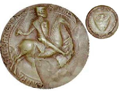 cf le titre.